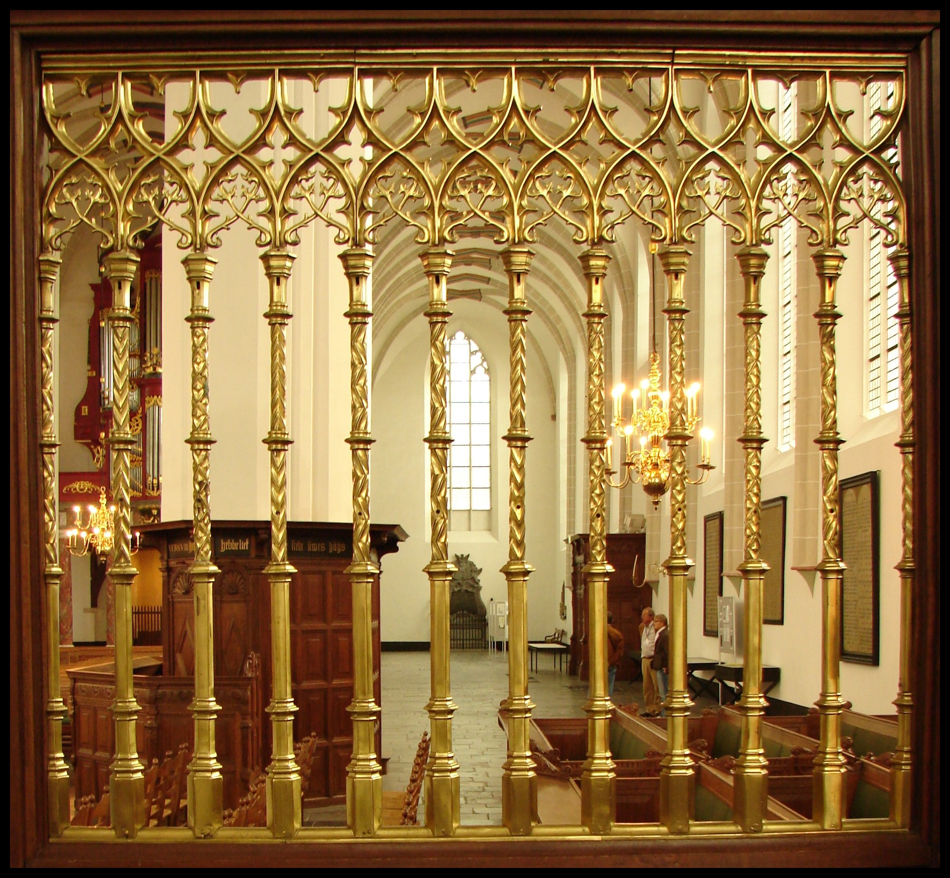 Het koorhek van de Jacobikerk te Utrecht